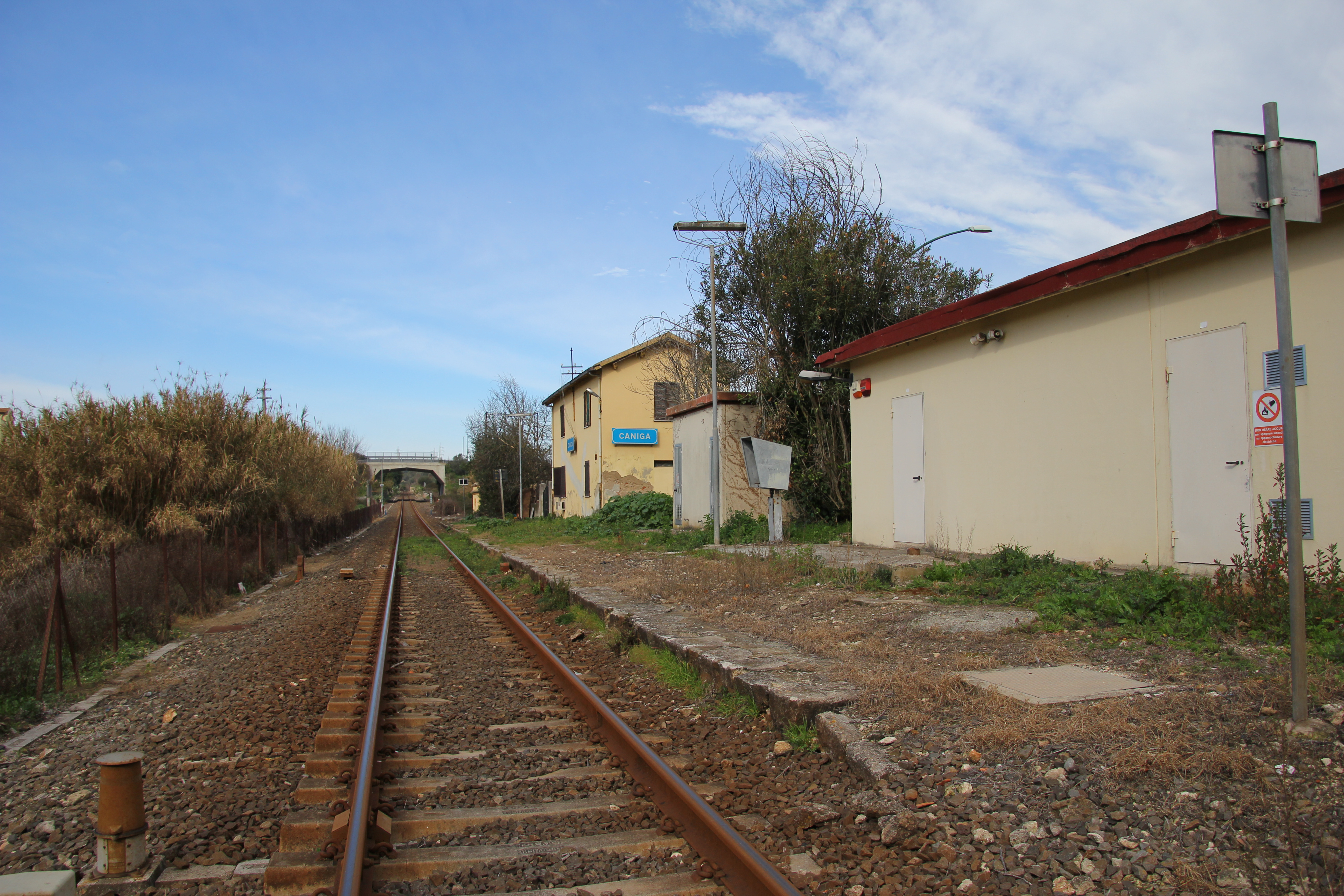 Sassari - Stazione di Caniga